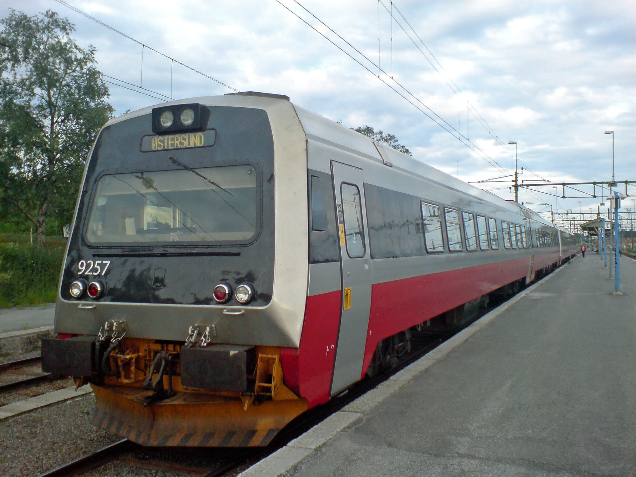 "Mittnabotåget" at Östersund central station (2 juli 2007). My own pichture.